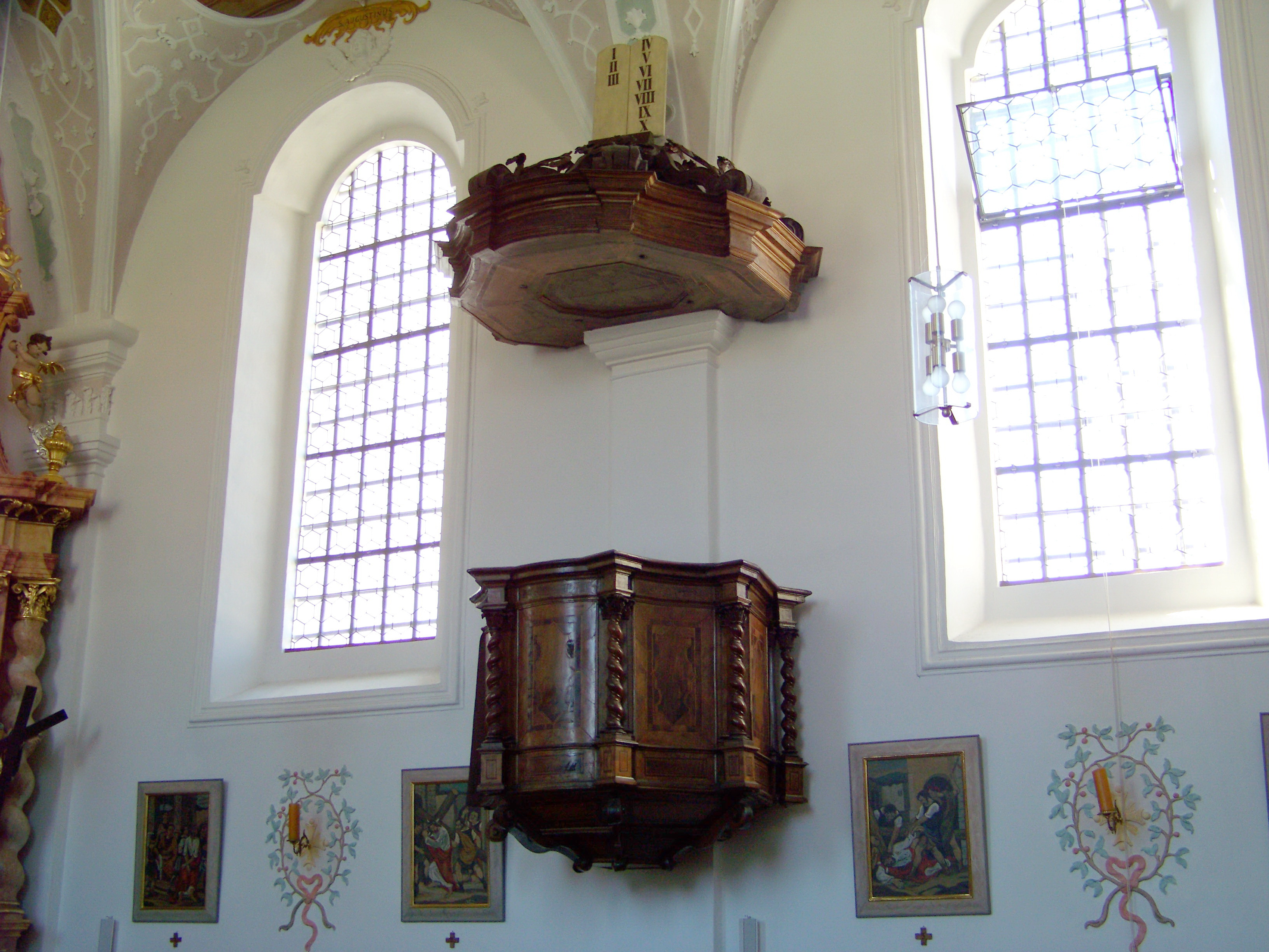 Furth bei Landshut (Niederbayern) Landshuter Straße 14. Katholische Kirche St. Sebastian. Saalkirche mit eingezogenem Chor. Spätgotische Anlage des 15. Jahrhunderts, barockisiert 1741; mit Ausstattung. Kanzel mit gewundenen Säulchen und Rokokointarsien.